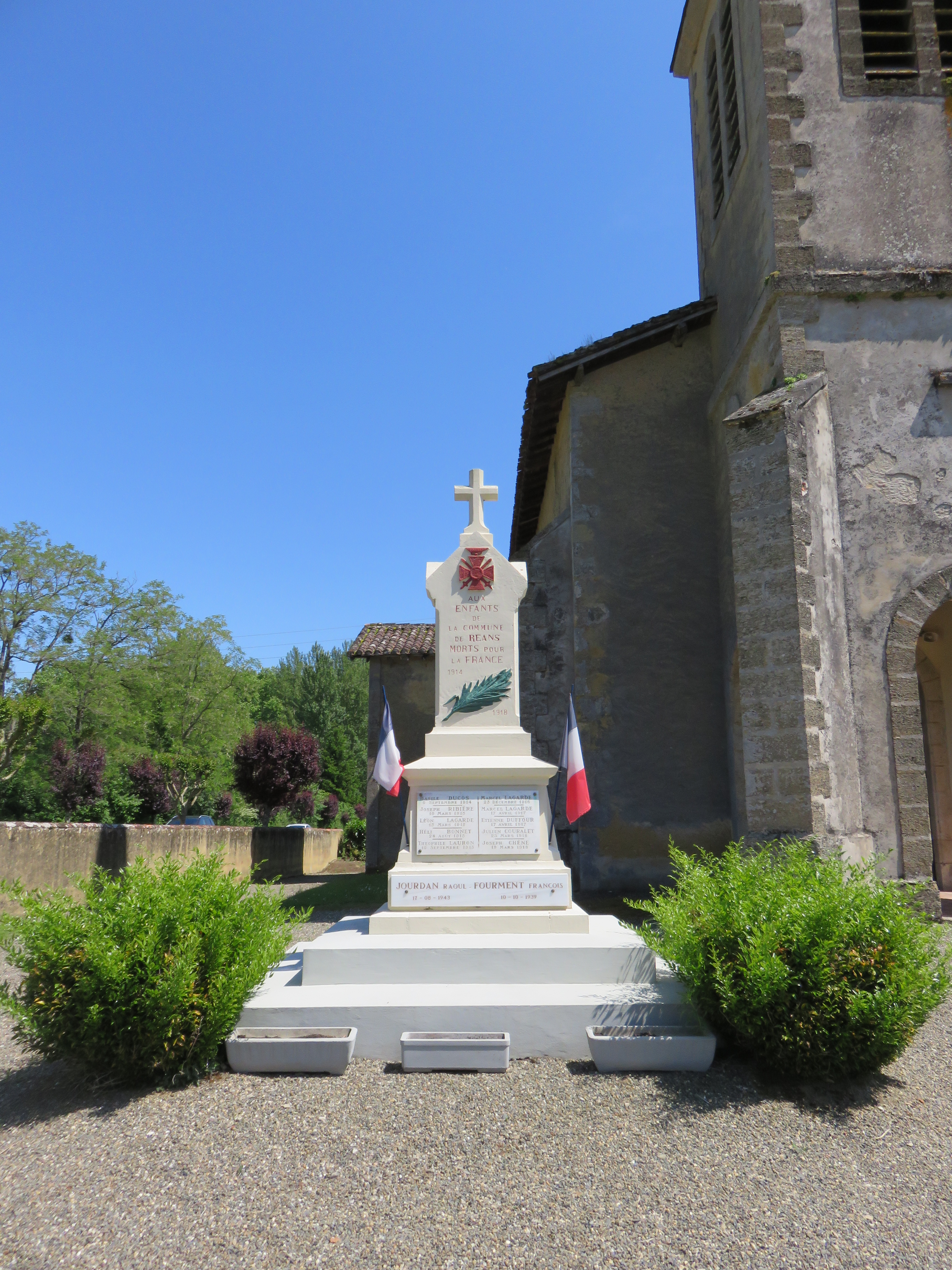 Monuments aux morts de Réans (Gers, France).